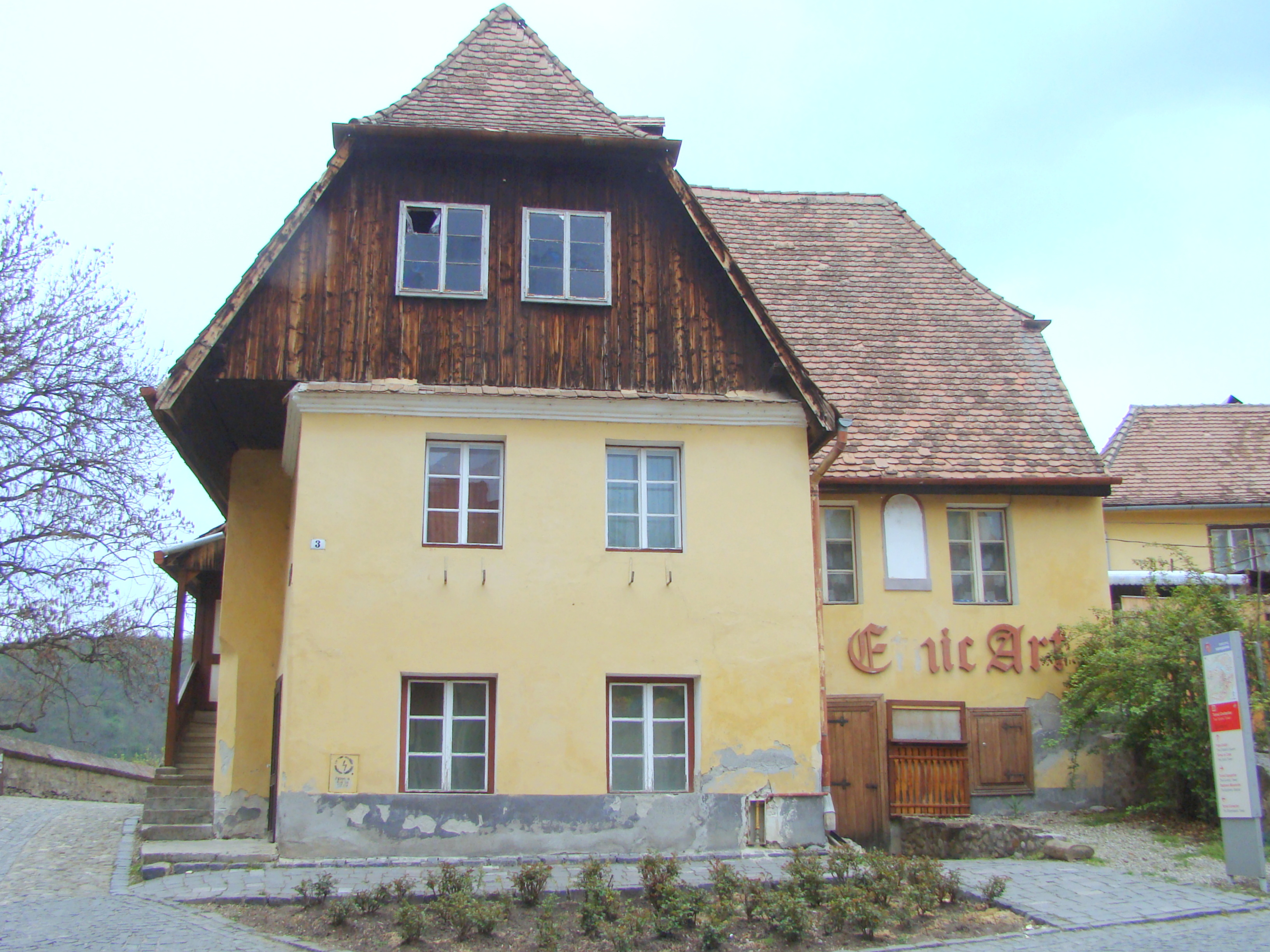 Casa Jakody, municipiul Sighișoara, str. Zidul Cetății 3 1772